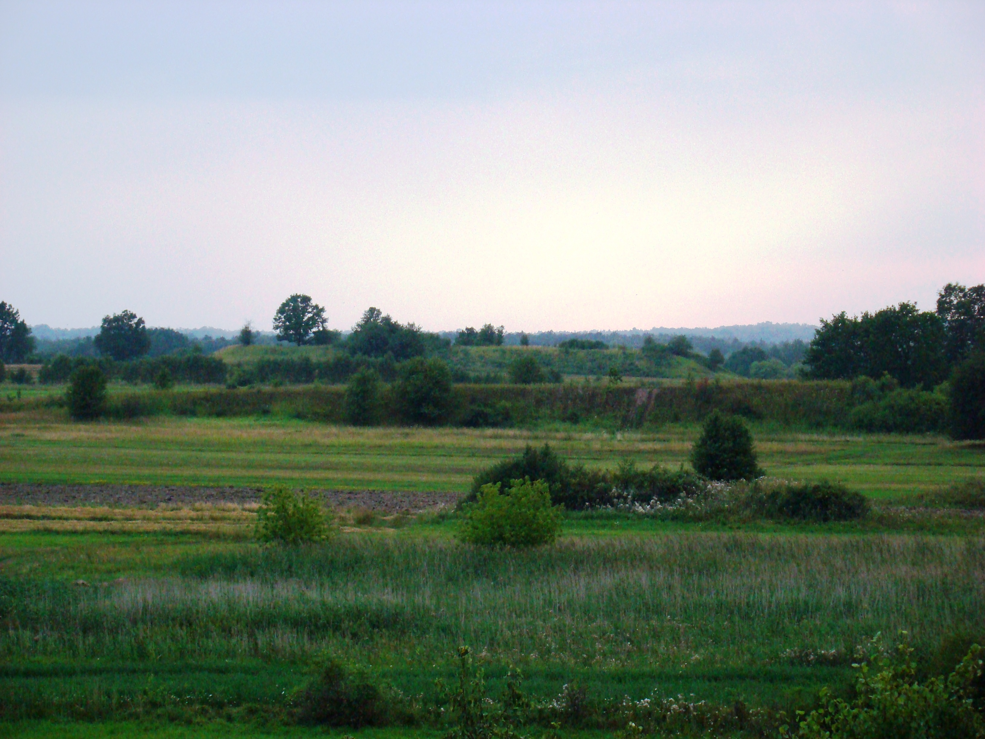 Hałdy kopalni rud żelaza "Piotr" w Jastrzębiu